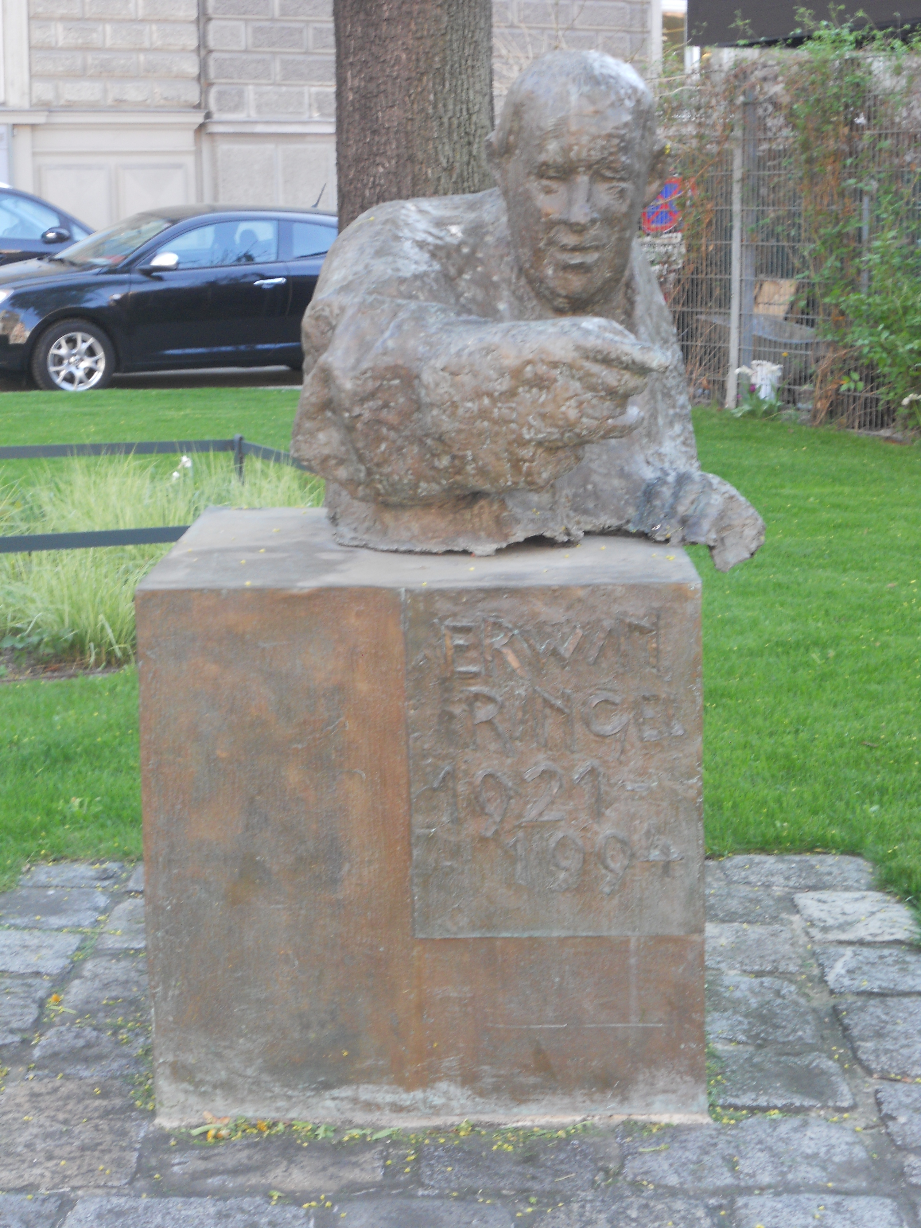 Erwin Ringel - Denkmal, Schlickplatz